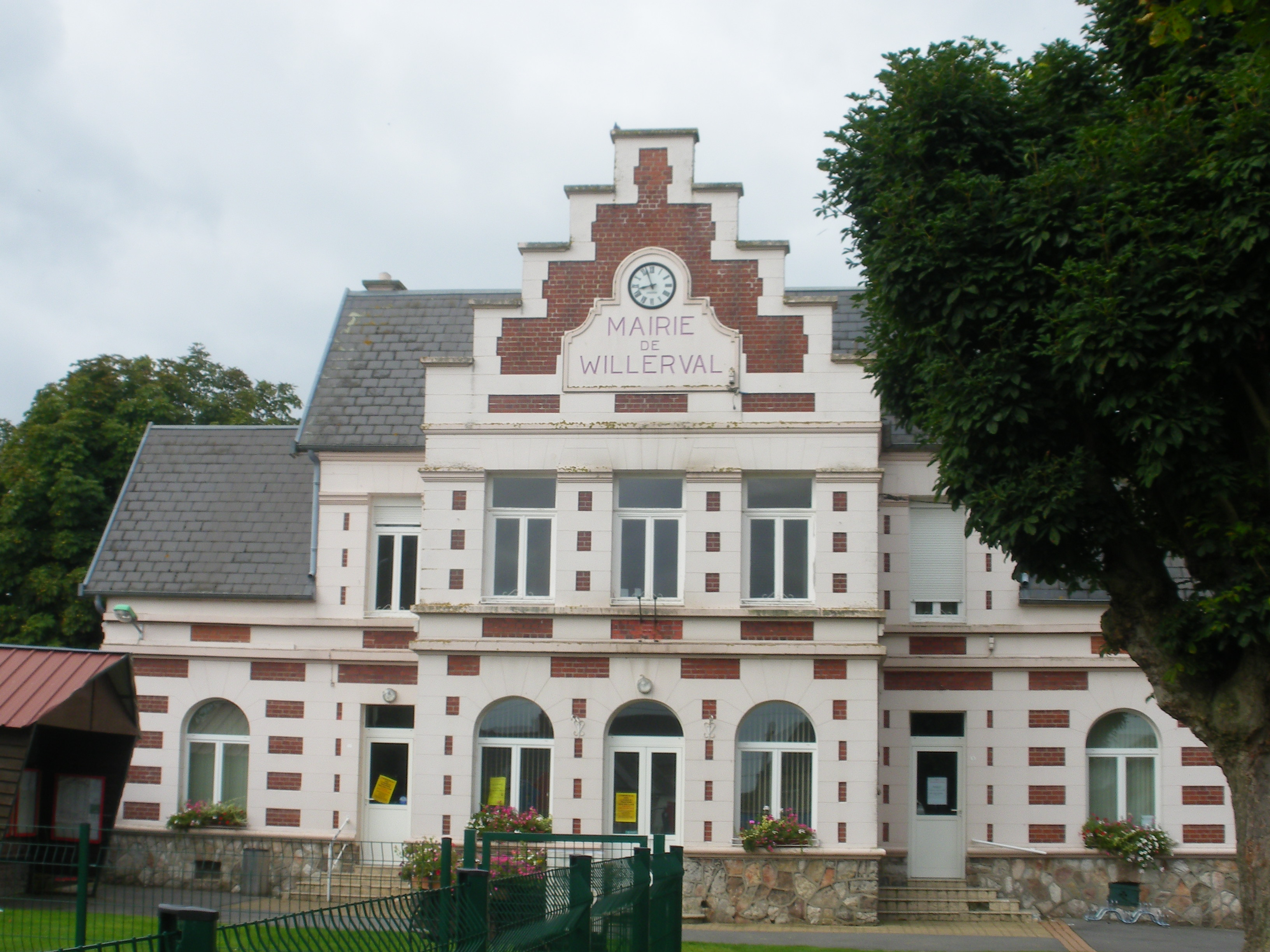 Vue de la mairie de Willerval.